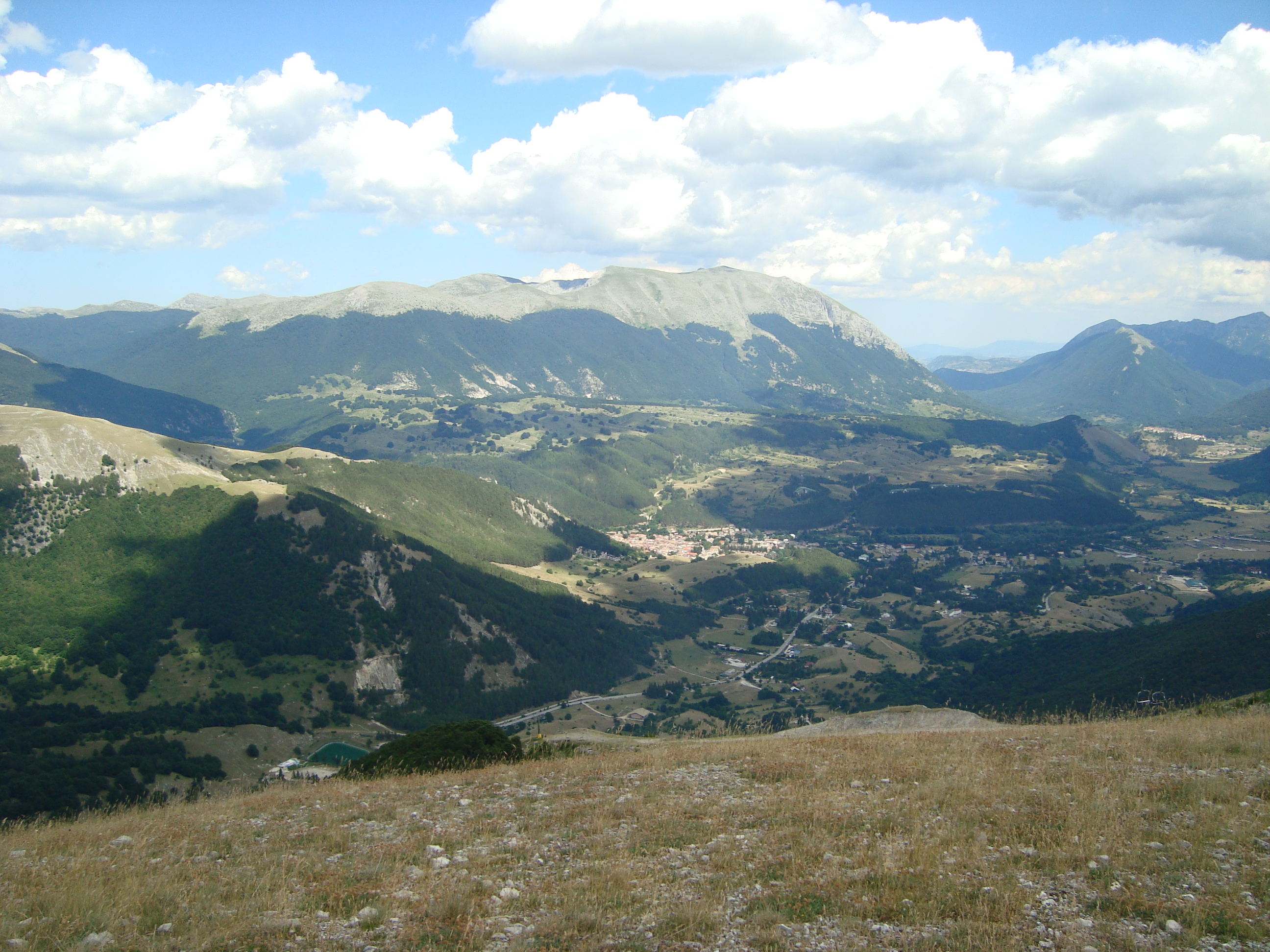 Pescasseroli from Monte delle Vitelle (1 845 m)